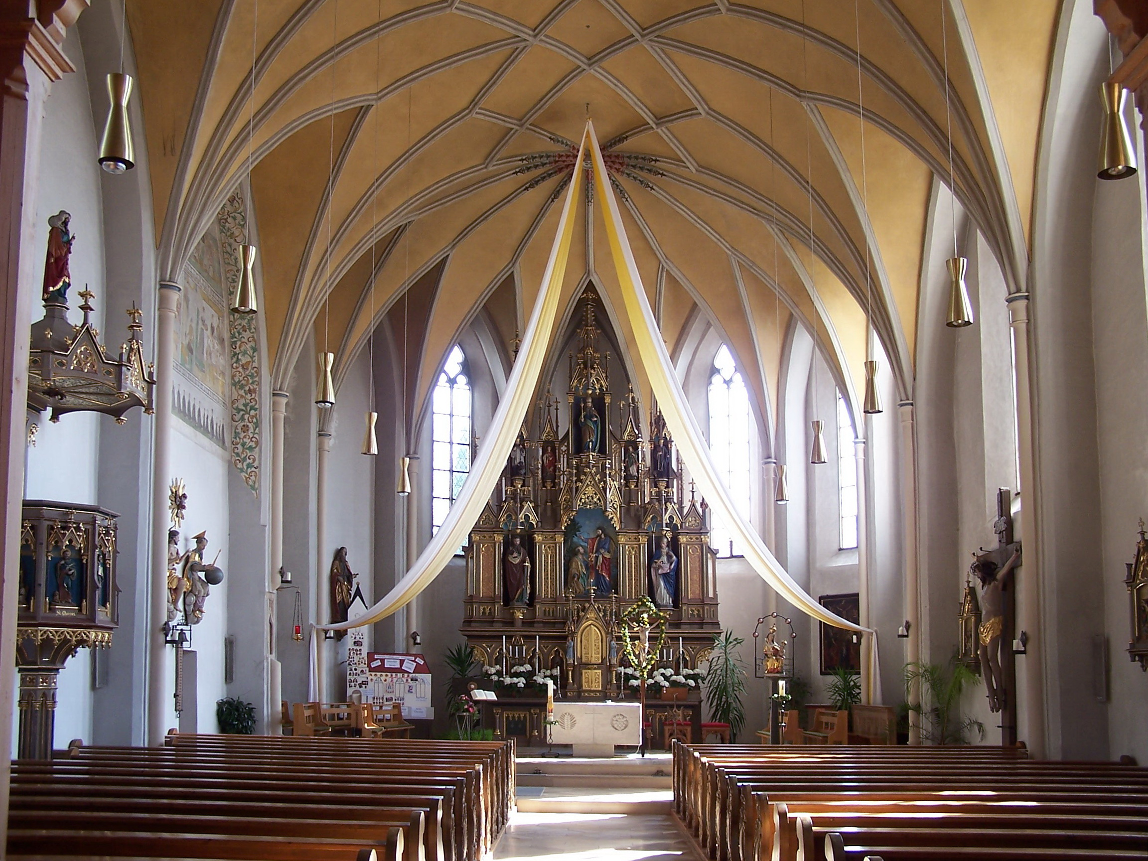 Ergolding, Lindenstraße 94. Katholische Kirche St. Peter und Paul. Saalkirche, spätgotische Anlage, zweiten Hälfte 15. Jahrhundert, Südseite mit Turm älter, Gliederung durch Streben und umlaufenden Dachfries, südseitig Chorflankenturm mit Geschossgliederung, Achteckaufsatz und Spitzhelm. Innenraum mit netzförmig figuriertem Rippengewölbe. Neugotische Einrichtung.